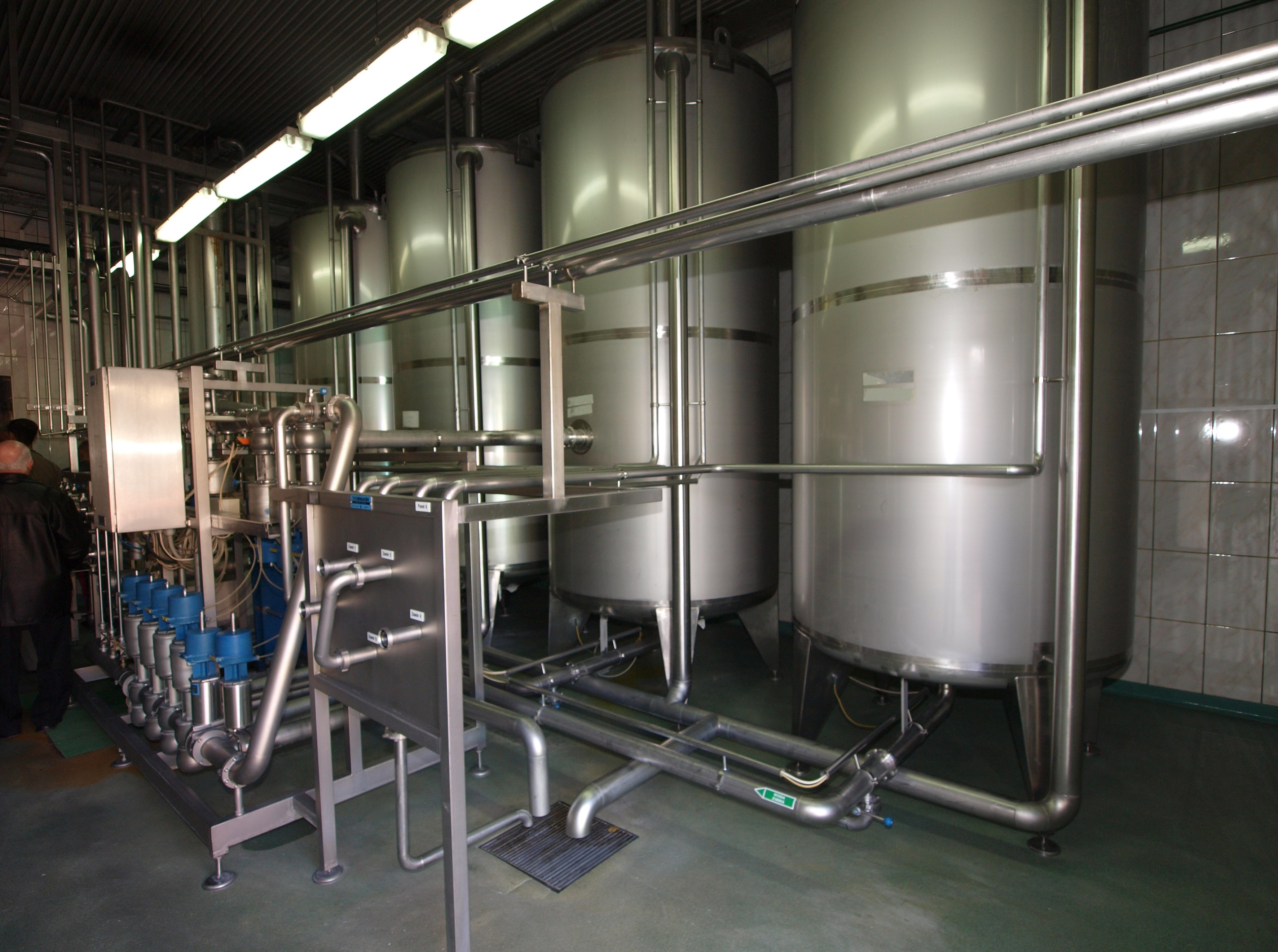 Browary Górnośląskie w Zabrzu. Instalacja do filtrowania piwa...